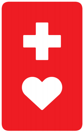 東京都によるヘルプマーク。